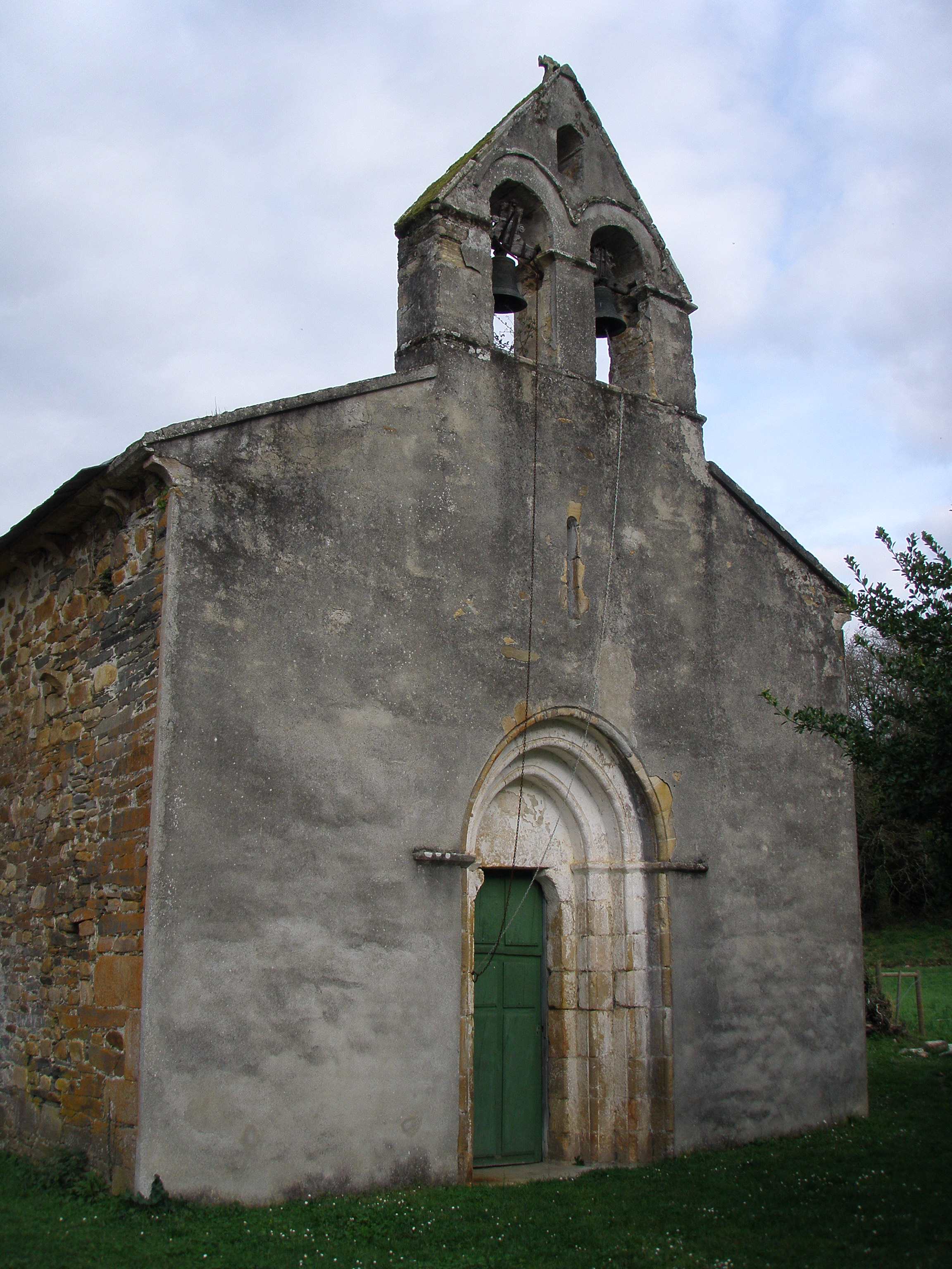 Iglesia románica de San Xián de Veiga, en A Pobra do Brollón, Lugo, España.